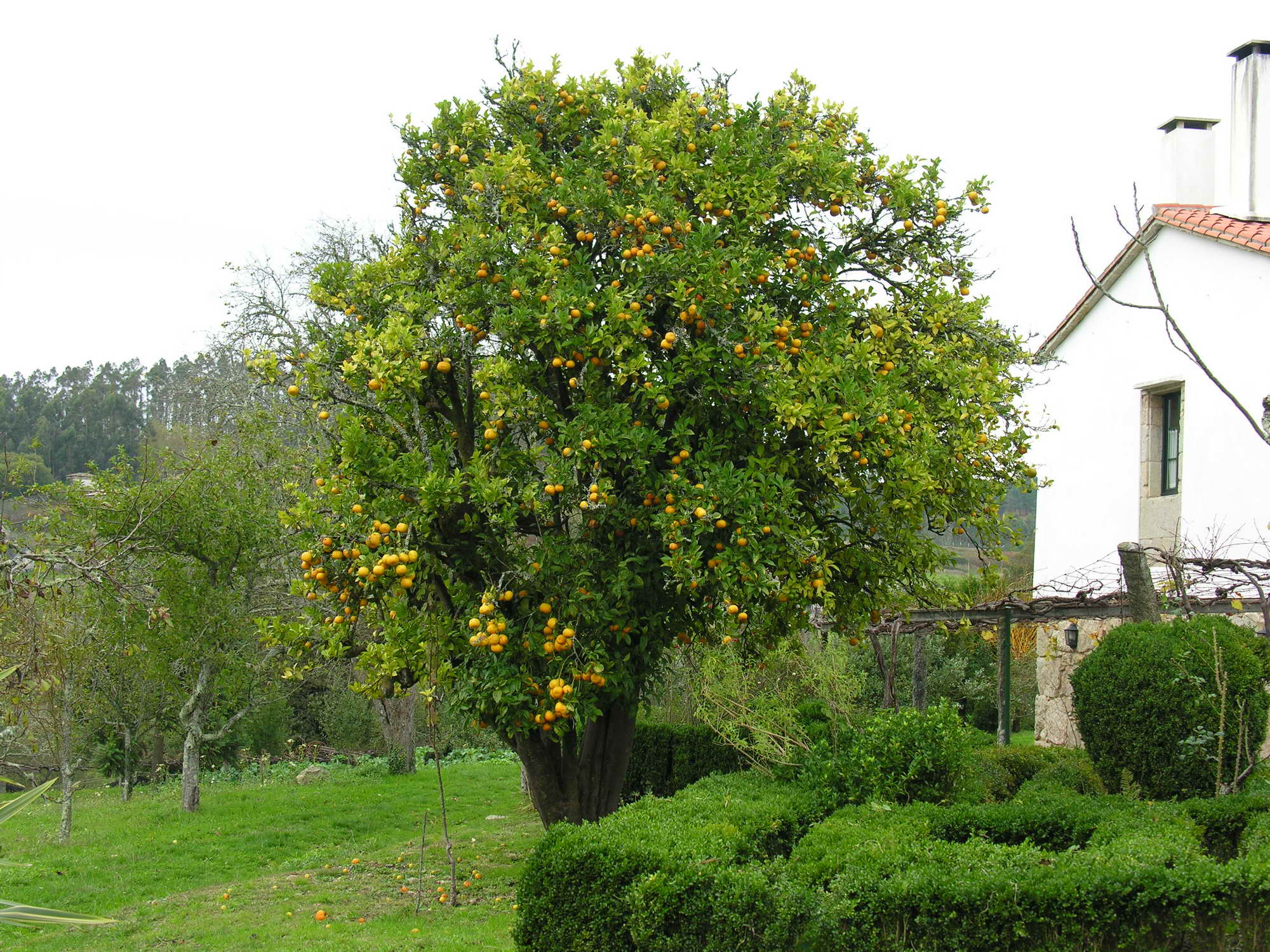 self made. Teaño - Cuntis - Galicia - Spain